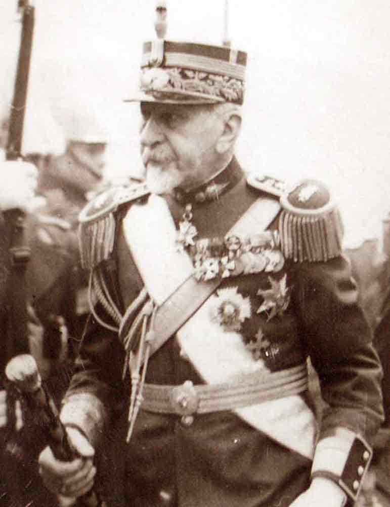 Constantin Prezan Izvorni vir slike: Spletna stran: Muzeul Judetean "Stefan cel Mare" Vaslui